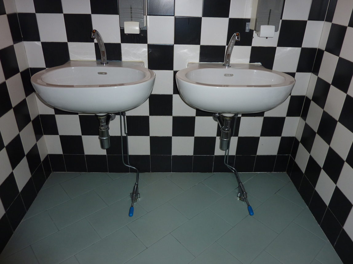 Diese Wasserhähne lassen sich nur per Fußpedal bedienen.